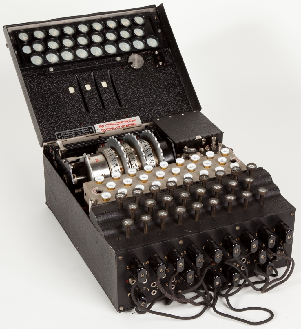 Macchina crittatrice e decrittatrice. Esposta presso il museo nazionale della scienza e della tecnologia "L. Da Vinci" di Milano. La macchina Enigma si presenta come una scatola metallica scura con, sul lato superiore, una tastiera riportante 26 lettere posta inferiormente rispetto ad una sua esatta riproduzione in versione di "spie luminose" (visore), tali, cioè, che una lettera della tastiera superiore si illumina ogni qualvolta viene premuto un tasto in quella inferiore. Aprendo la macchina, sotto il visore sono visibili 28 portalampade: 26 per illuminare le lettere del visore prima descritto, 1usato come provalampade e 1 come tester. Superiormente alla "tastiera luminosa" sono posizionate a sinistra tre feritoie, da ciascuna delle quali si affaccia la corona dentata (anello) di un disco (rotore, tre in tutto) e una corrispondente finestrella che mostra la cifra di un contatore, e a destra un selettore meccanico. Frontalmente, la macchina presenta un pannello (steker) a 52 plug o prese, ove sono inseribili degli spinotti per il completamento di circuiti elettrici (collegamenti tra tastiera e primo rotore).